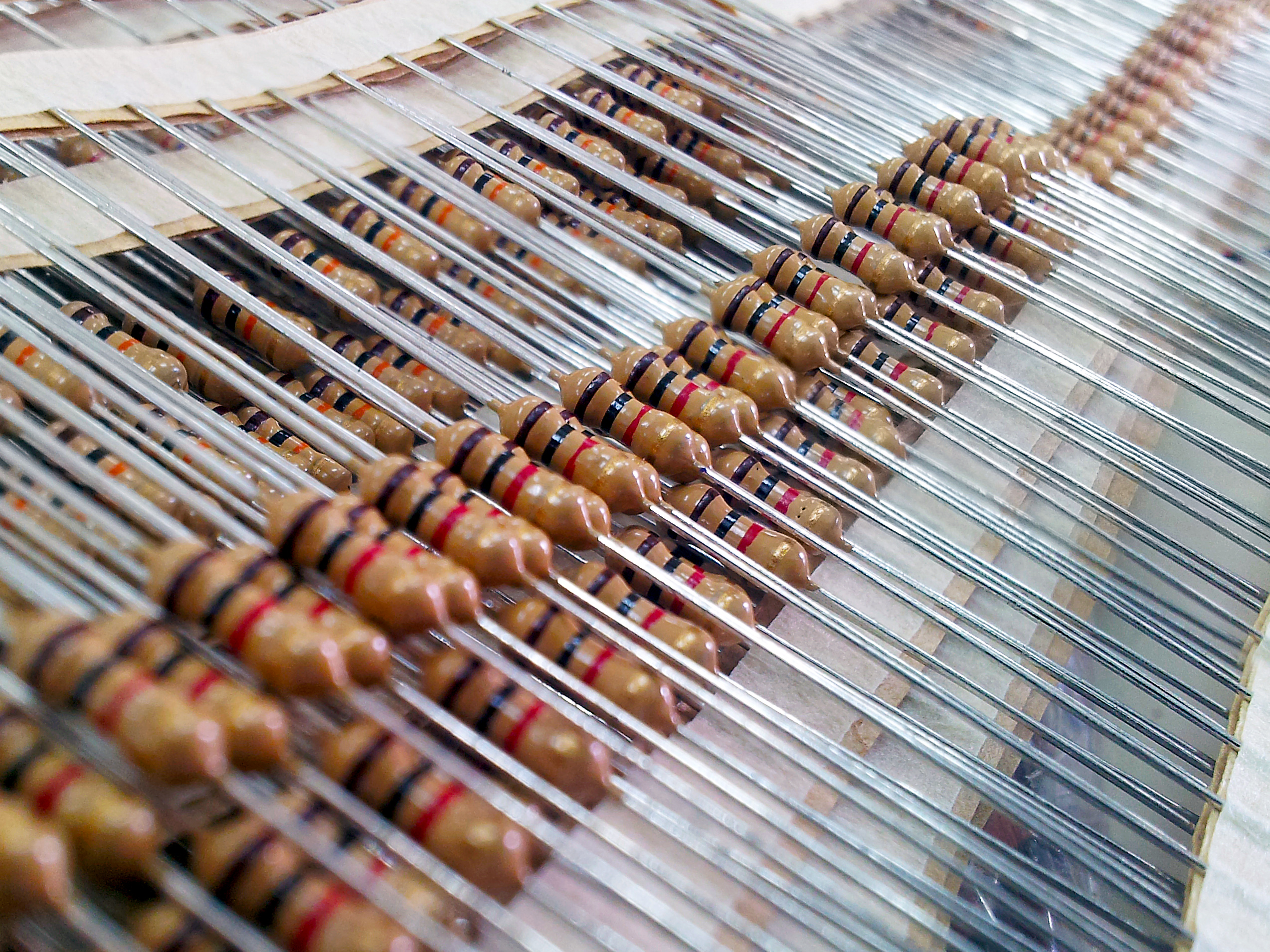 Bant üzerinde dirençler